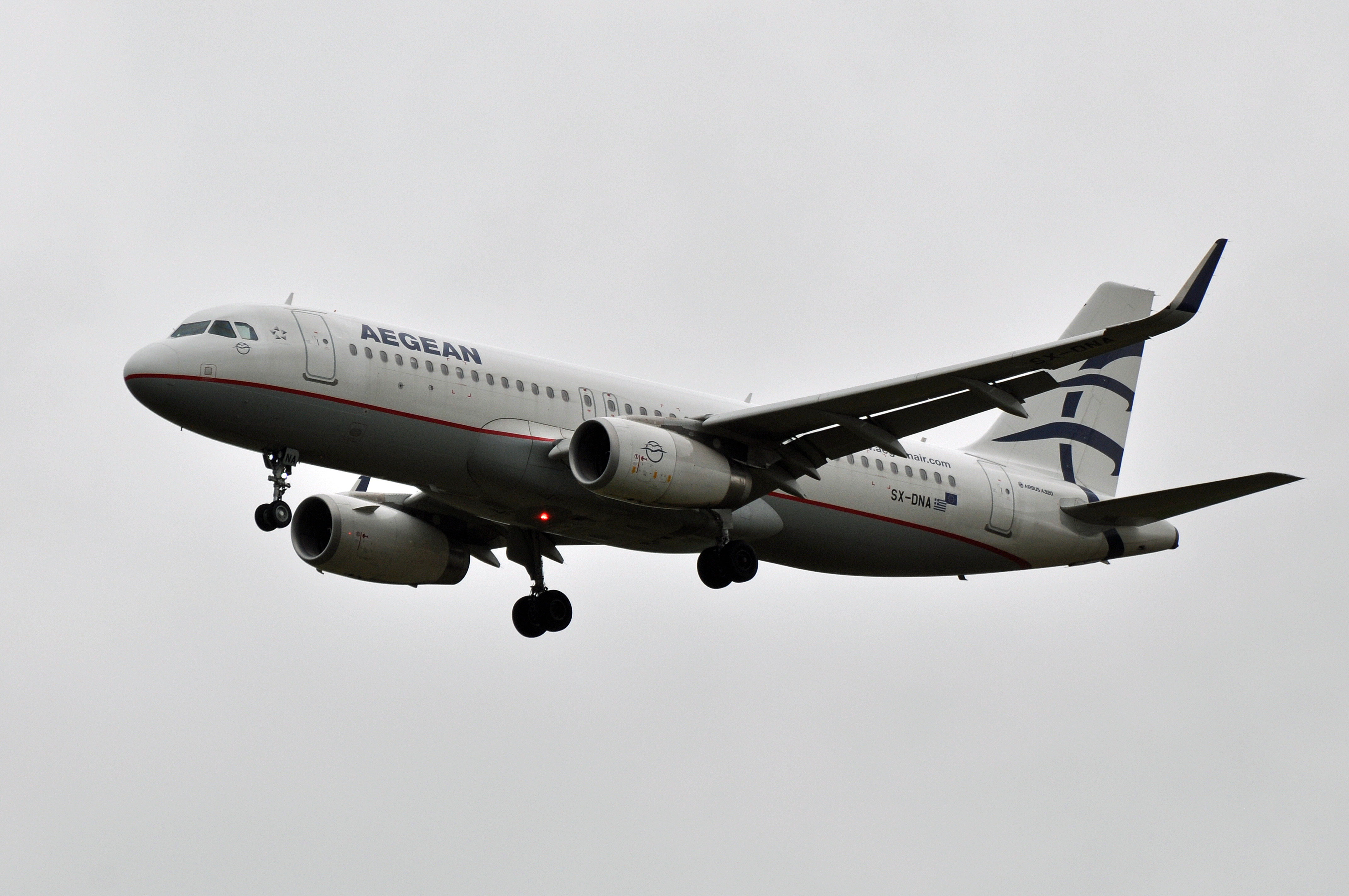 MSN 6655 A320-232 / A320 / A320-200 AEGEAN AIRLINES CDG AIRPORT